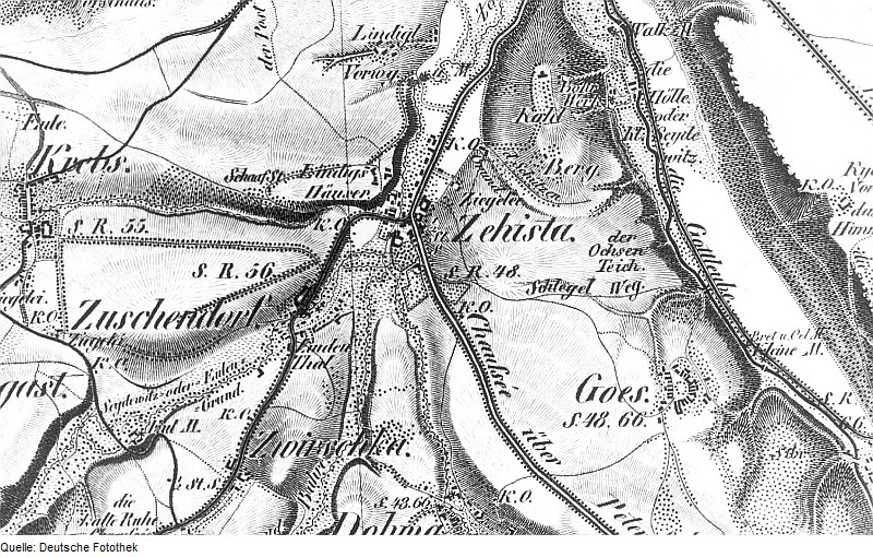 Original image description from the Deutsche Fotothek Pirna-Zehista. Oberreit, Sect. Dresden, 1821/22